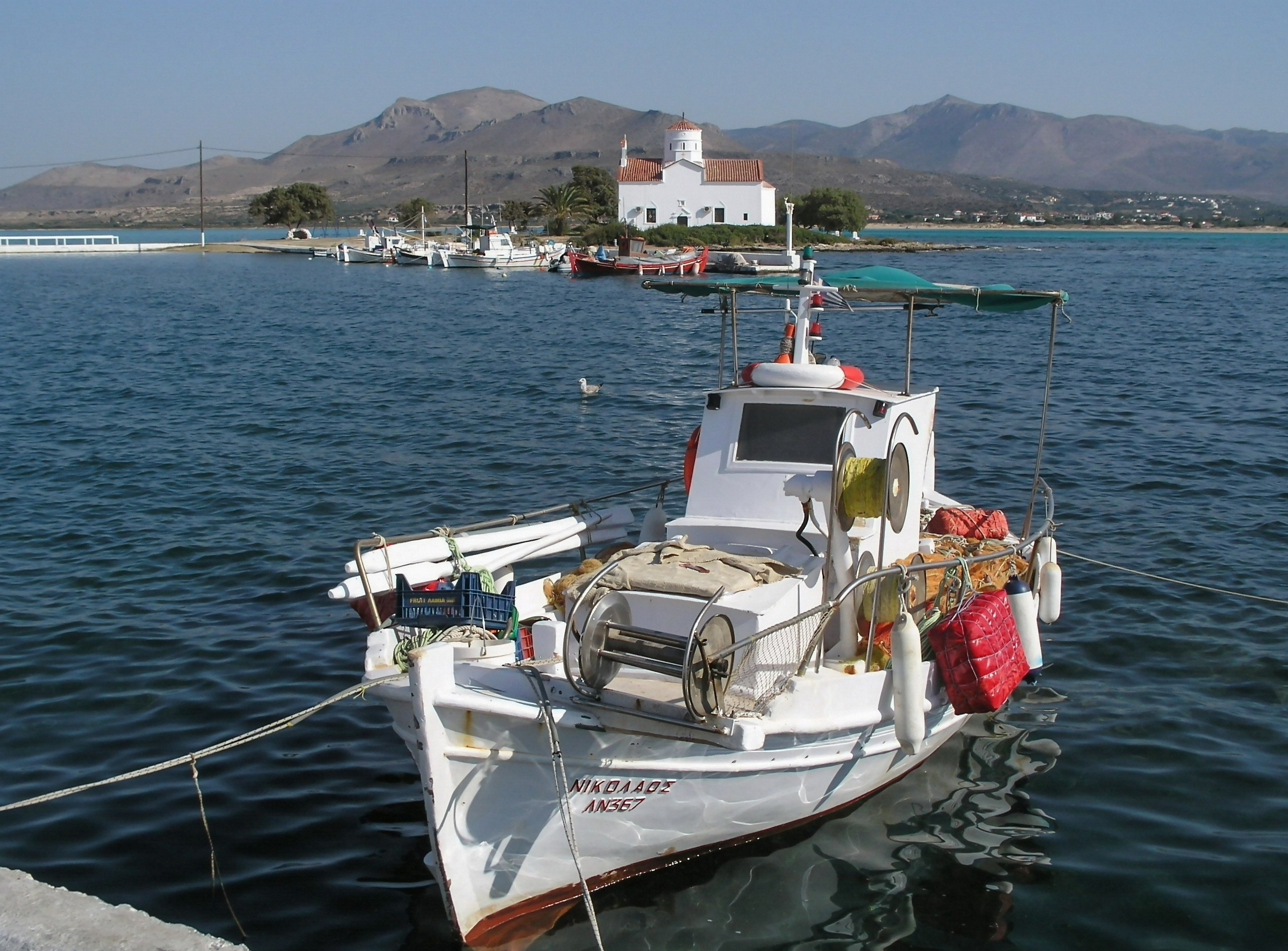 Elafonissos - Blick auf das Festland